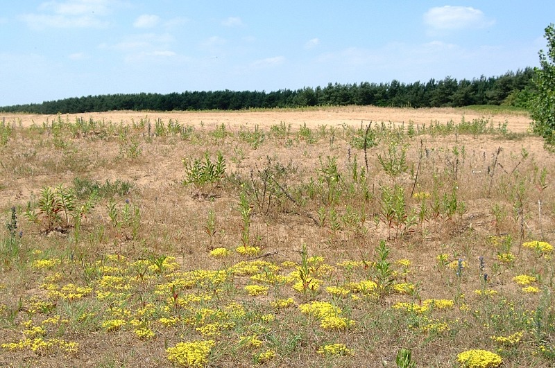 Sanddüne bei Darmstadt, Deutschland - Lebensraum der Kreiselwespe, Bembix rostrata